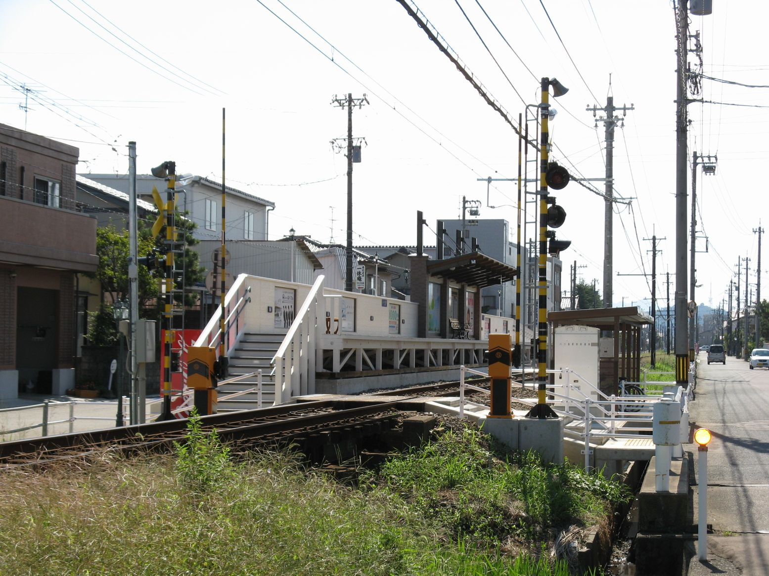 八ツ島駅ホーム 南望 基礎の部分がLRTの低床車輌に配慮しているのが分かる